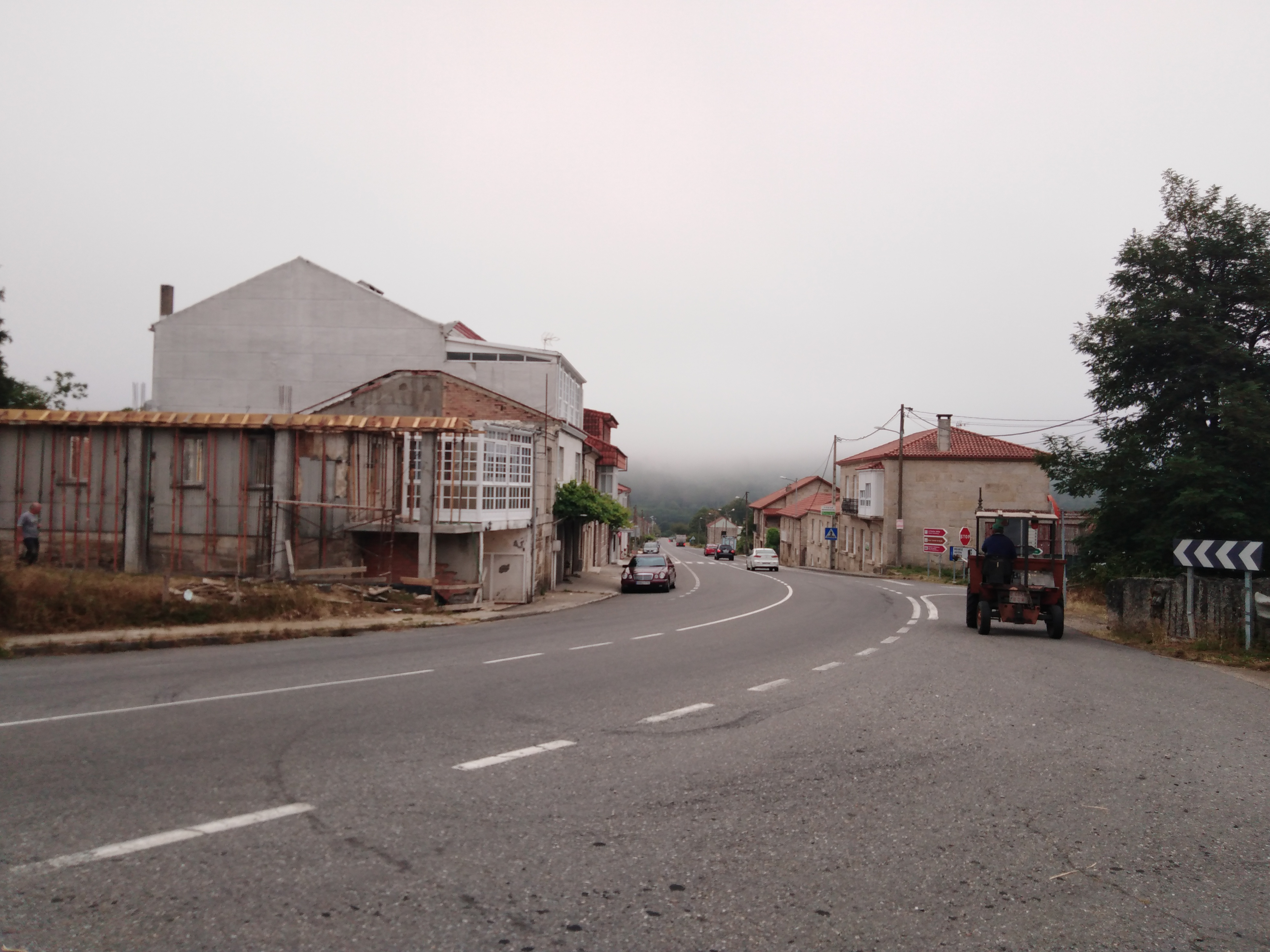 Estrada N-541 ao seu paso por Brués (Boborás)